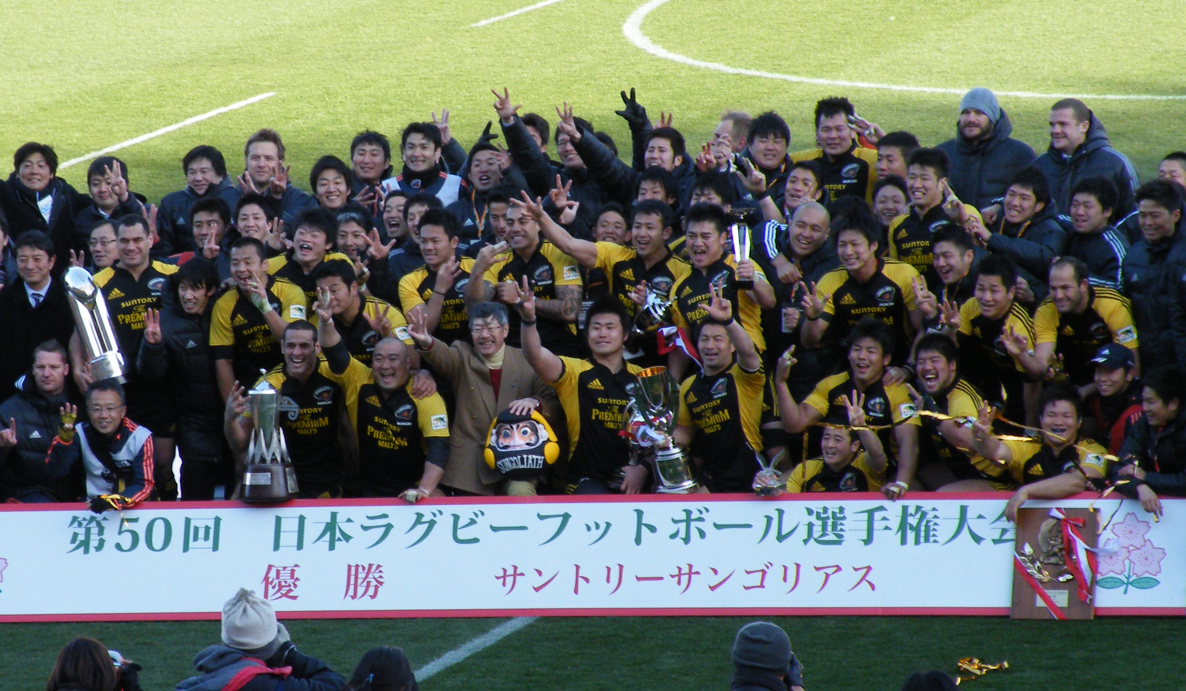 第50回日本ラグビーフットボール選手権大会で優勝したサントリーサンゴリアス